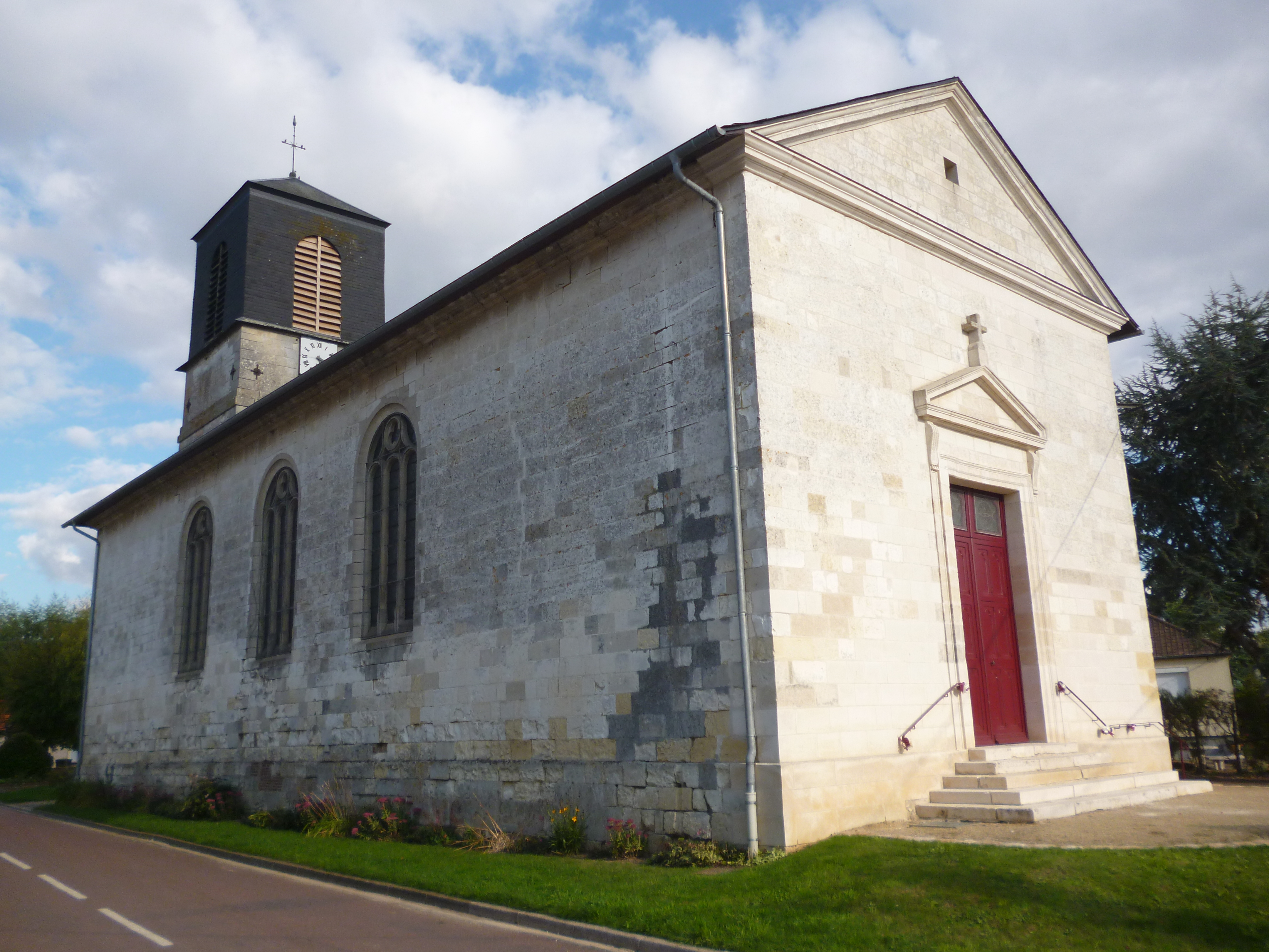 Eglise Saint-Sébastien du Mesnil-sur-Bulles (Oise).